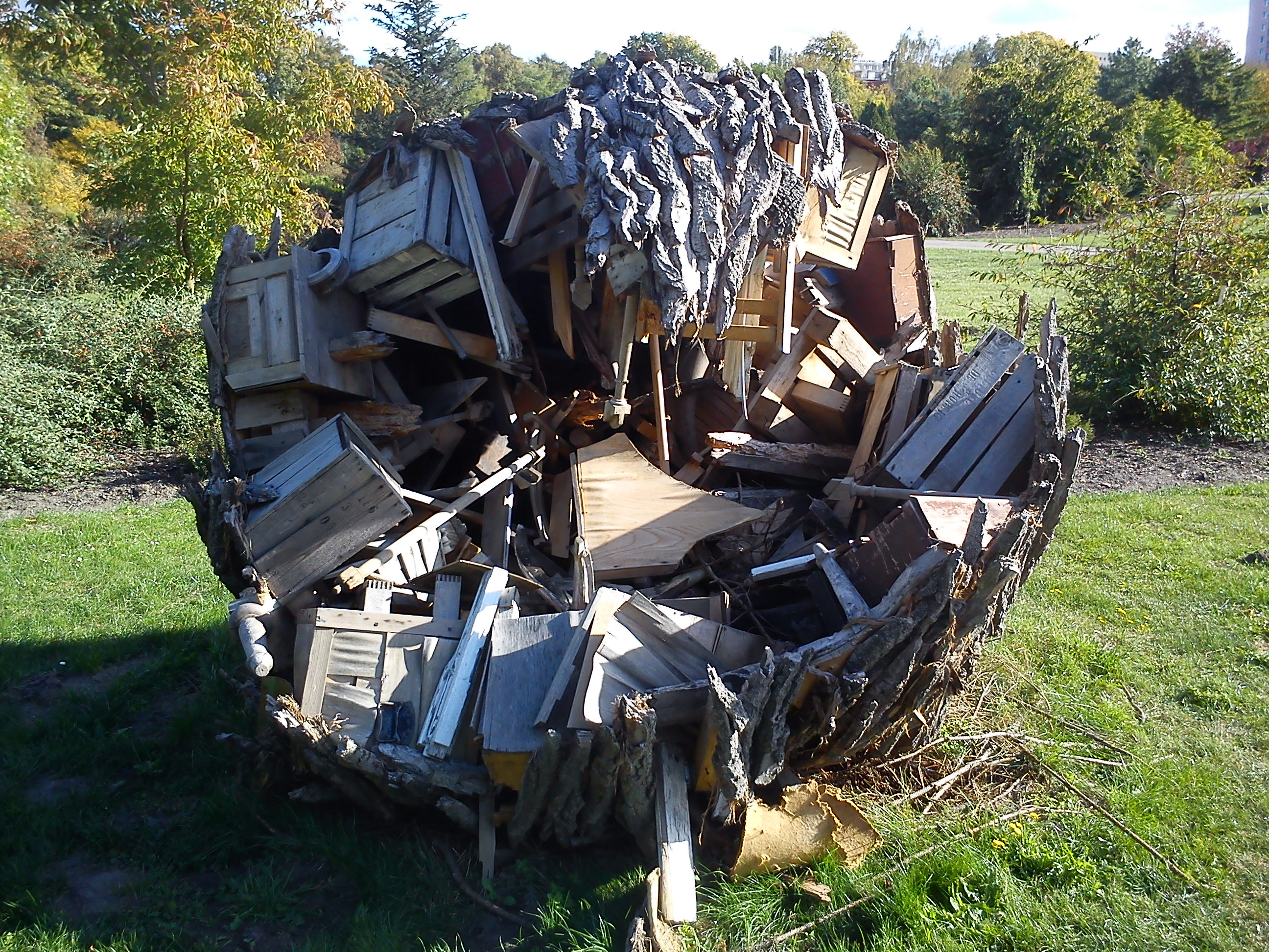 Ogród Botaniczny w Poznaniu. Rzeźba plenerowa. Cyryl Zakrzewski - Zaraza Wiedzy, 2012.